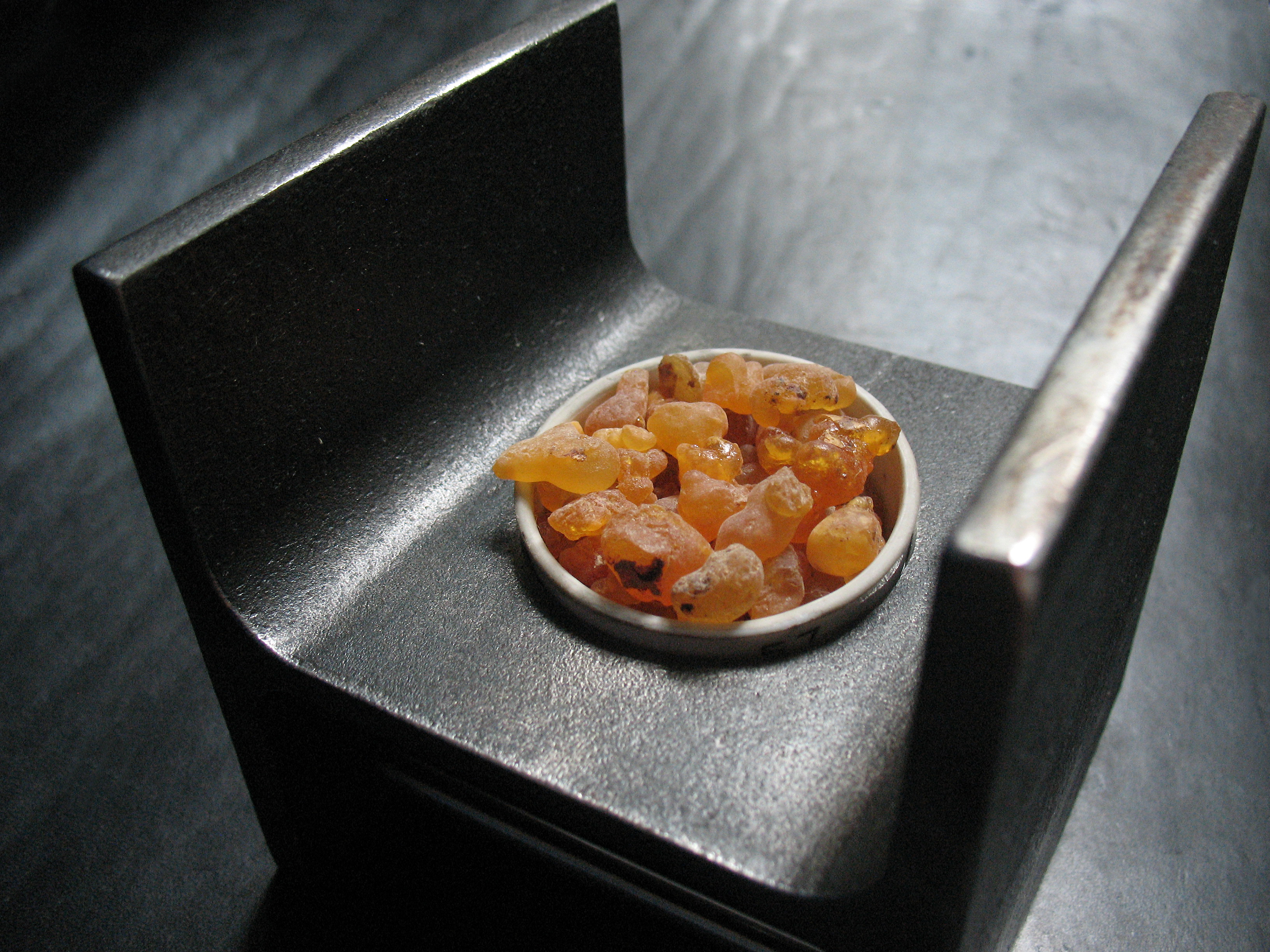 + 00000000001_Image_Weihrauch im Gefäß